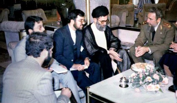 علی خامنه‌ای و فیدل کاسترو در حاشیه اجلاس سران عدم تعهد در زیمبابوه در سال ۱۳۶۵